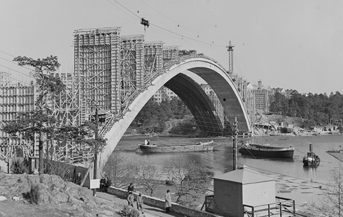 Tranebergsbron i Stockholm under uppförande ca. 1933